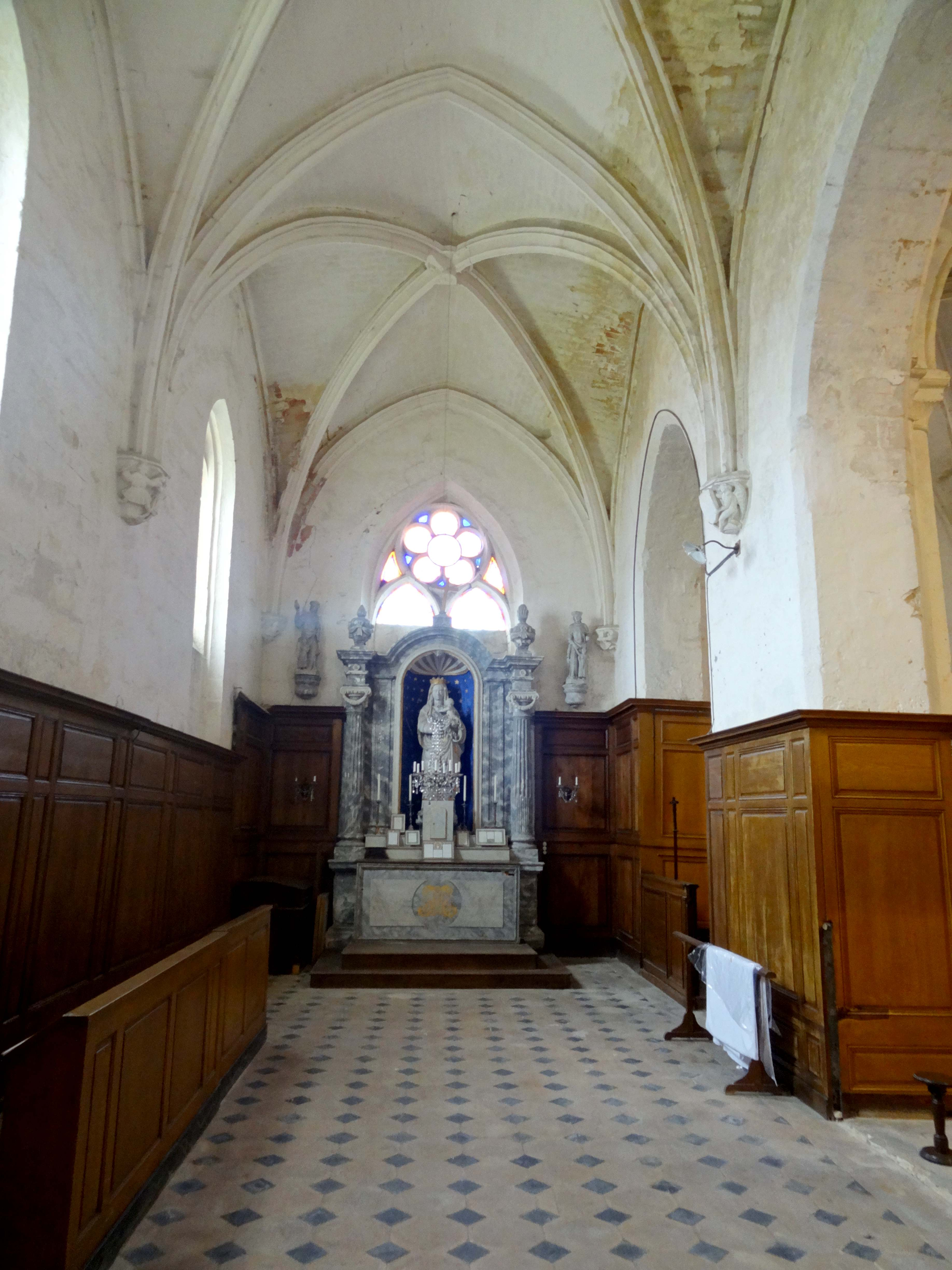 Intérieur de l'église - voir titre.